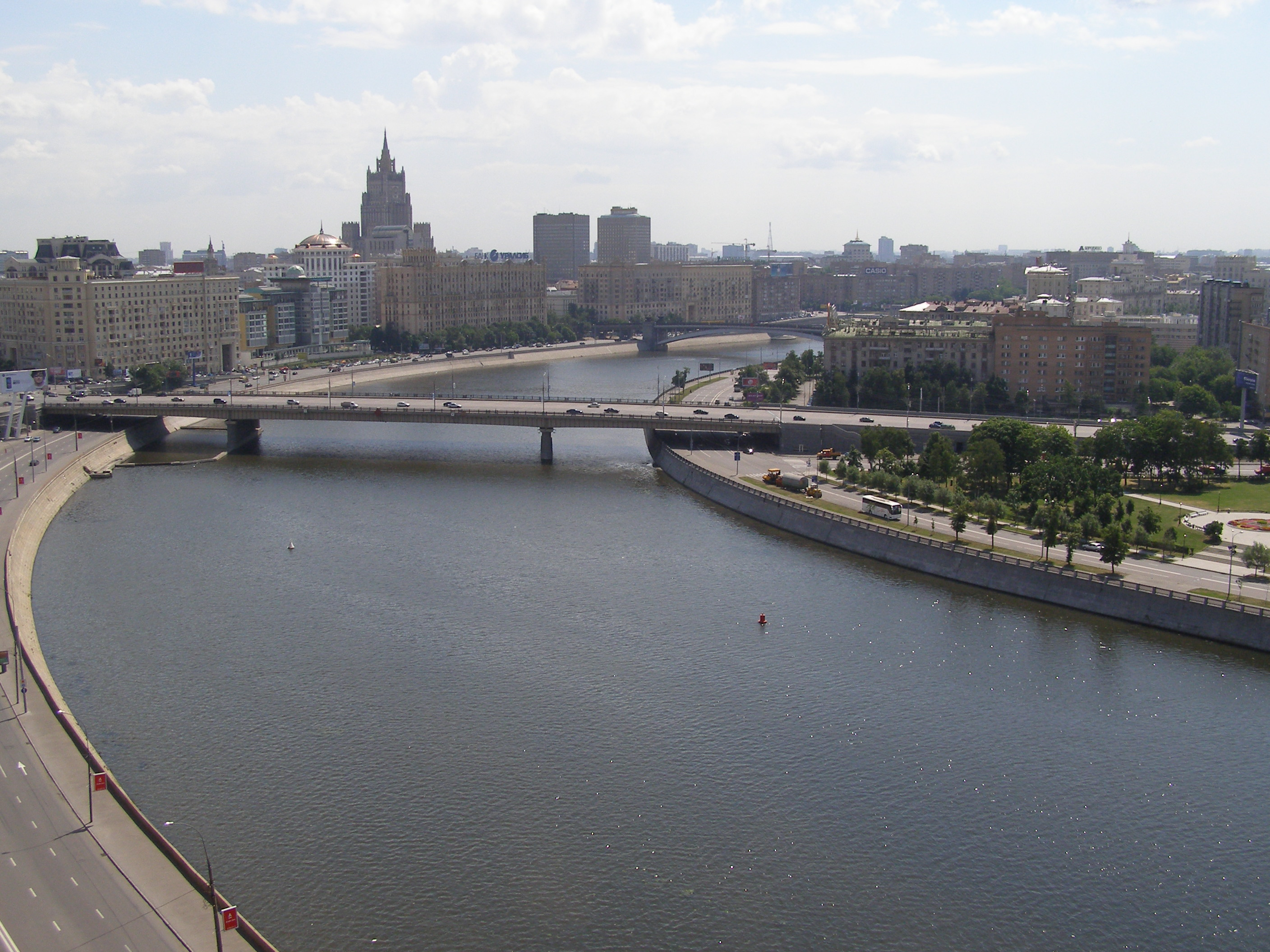 Вид на Новоарбатский мост с верхней площадки дома №6 по Краснопресненской набережной